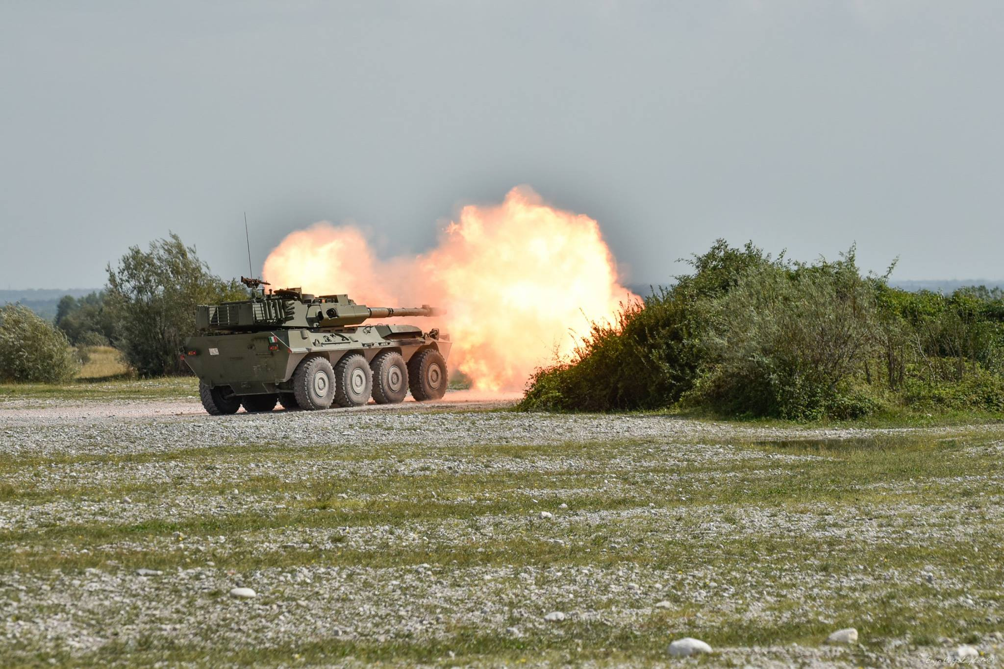 Blindo Centauro di Piemonte Cavalleria in azione sul poligono del Meduna Cellina